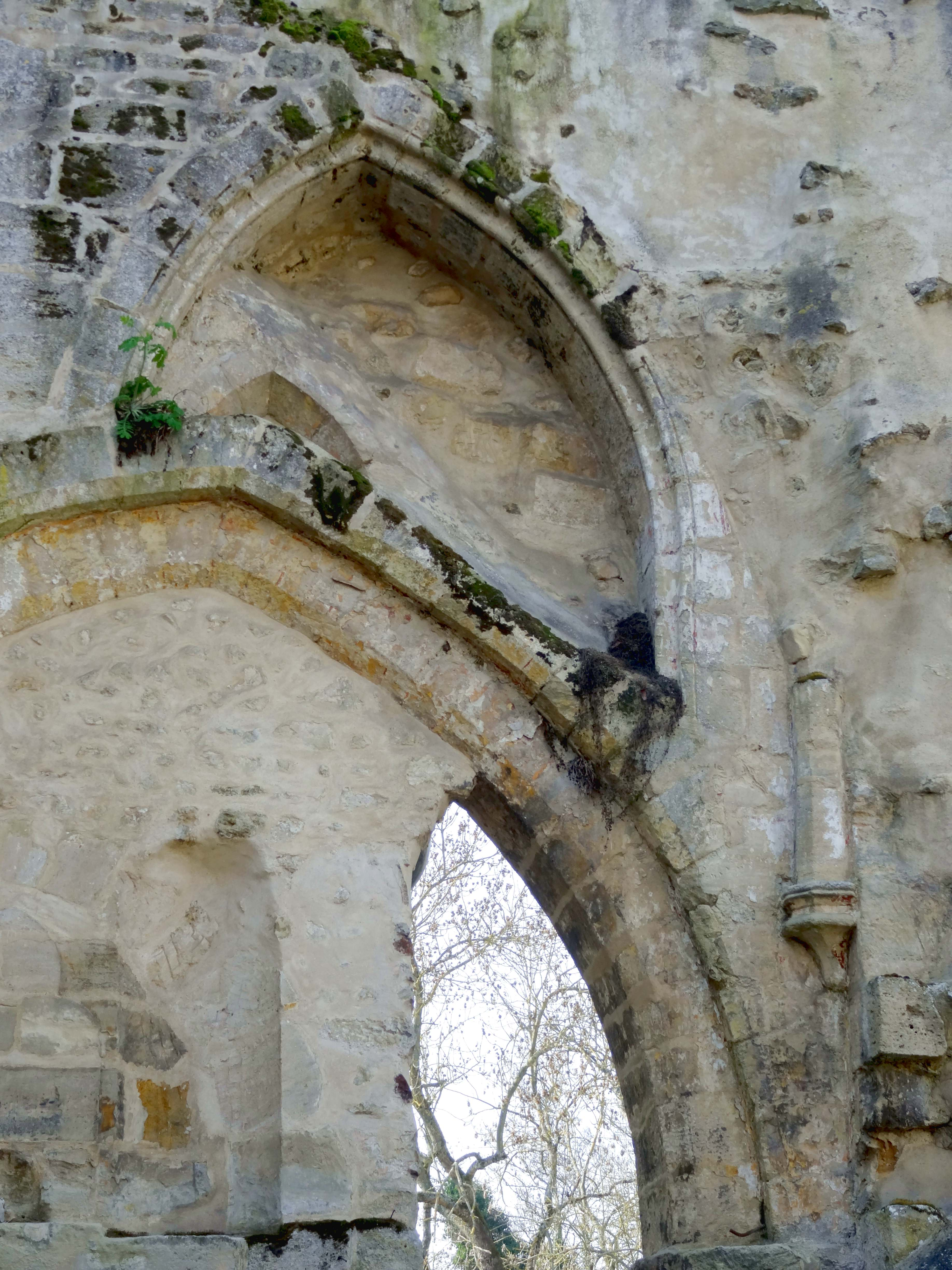 Intérieur de l'église - voir titre.